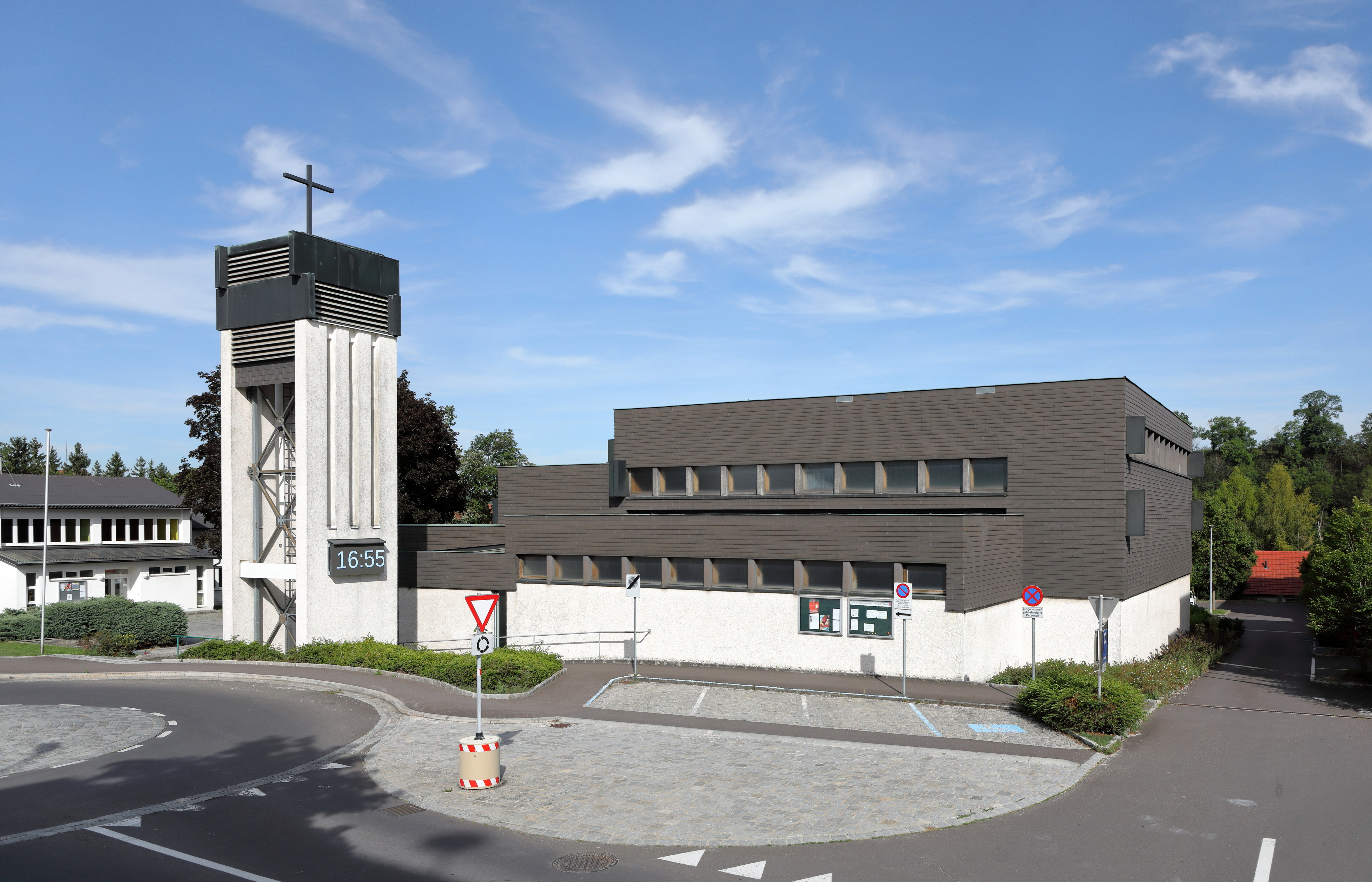 Westansicht der röm.-kath. Pfarrkirche hl. Berthold in Neuzeug, ein Ortsteil der oberösterreichischen Marktgemeinde Sierning.Der Spatenstich für die nach Plänen von Gottfried Nobl und Othmar Kainz errichtete Pfarrkirche erfolgte am 17. August 1969 und am 24. Oktober 1971 wurde die Kirche durch Bischof Franz Zauner feierlich geweiht. 1992 wurde im Zuge der Anschaffung von drei neuen Glocken bei der Glockengießerei Grassmayr der Kirchturm um rd. 6 Meter erhöht.